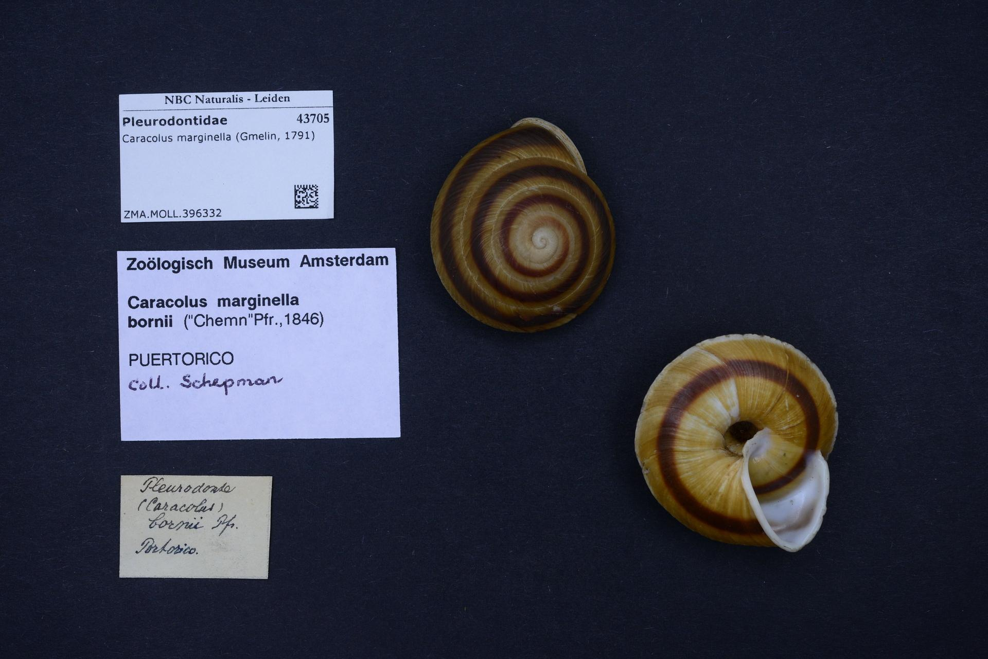 Caracolus marginella (Gmelin, 1791)